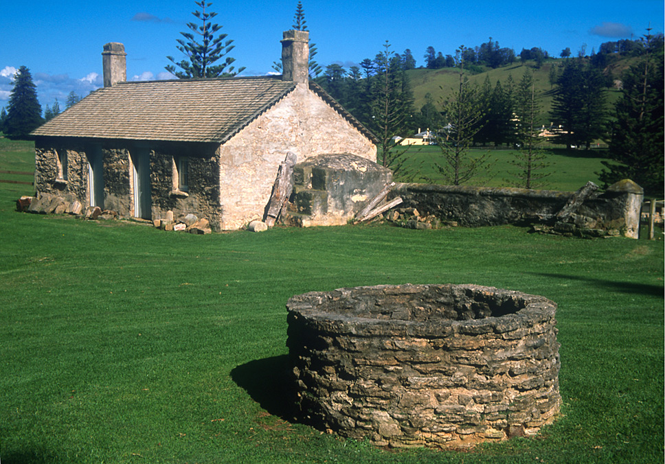 Norfolk Island jail.